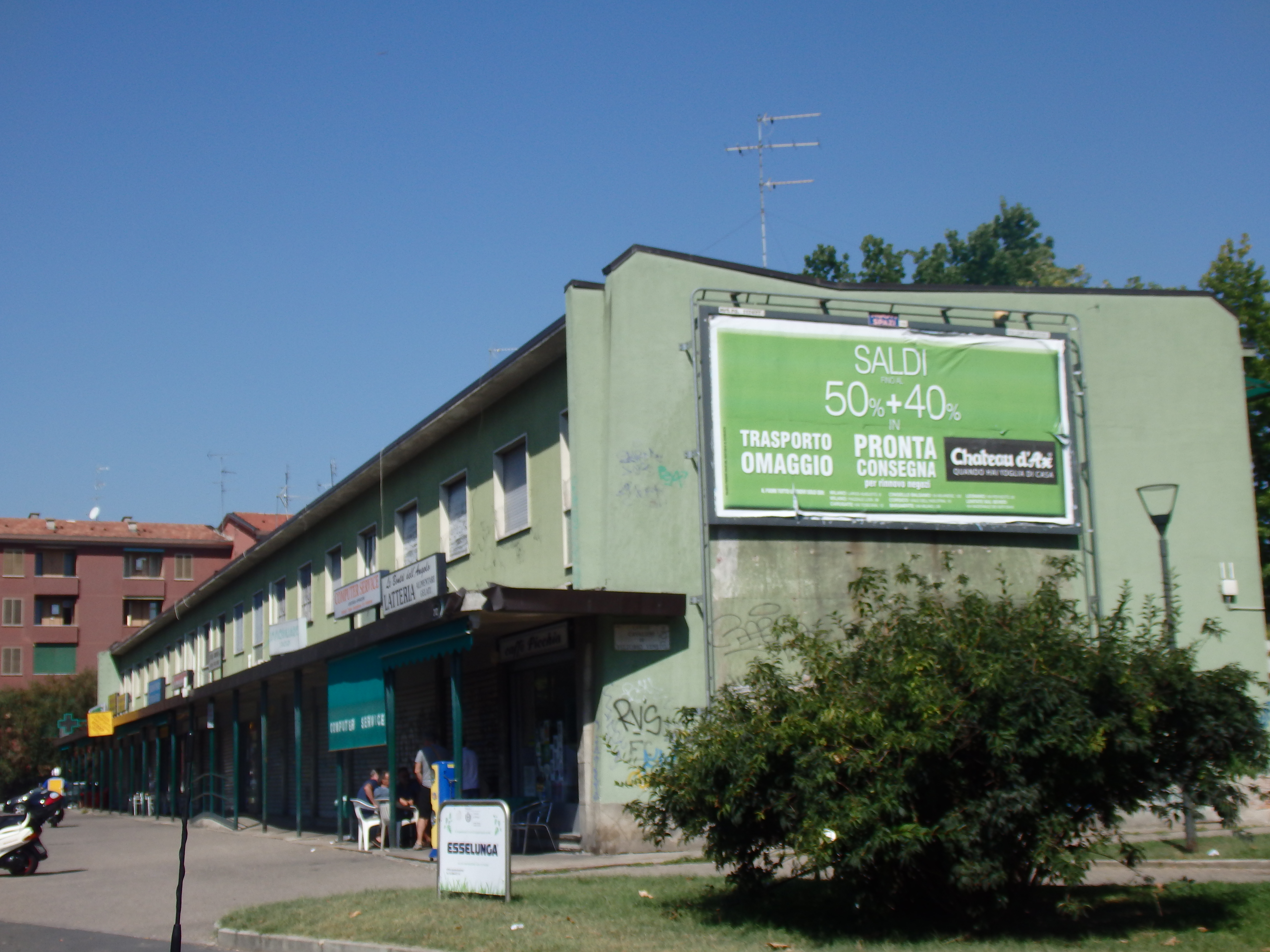 Milano, l'edificio dei negozi del quartiere INA-Casa "Baggio II", in via delle Forze Armate.